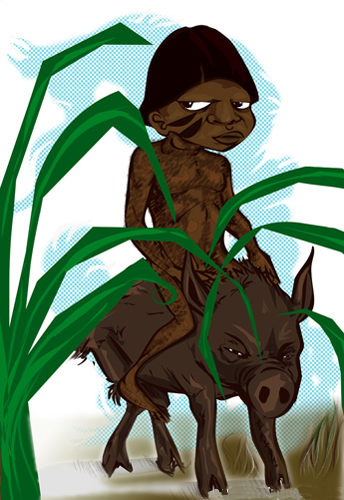 caipora, personagem folclorico, pertecente a lenda tupi guarani